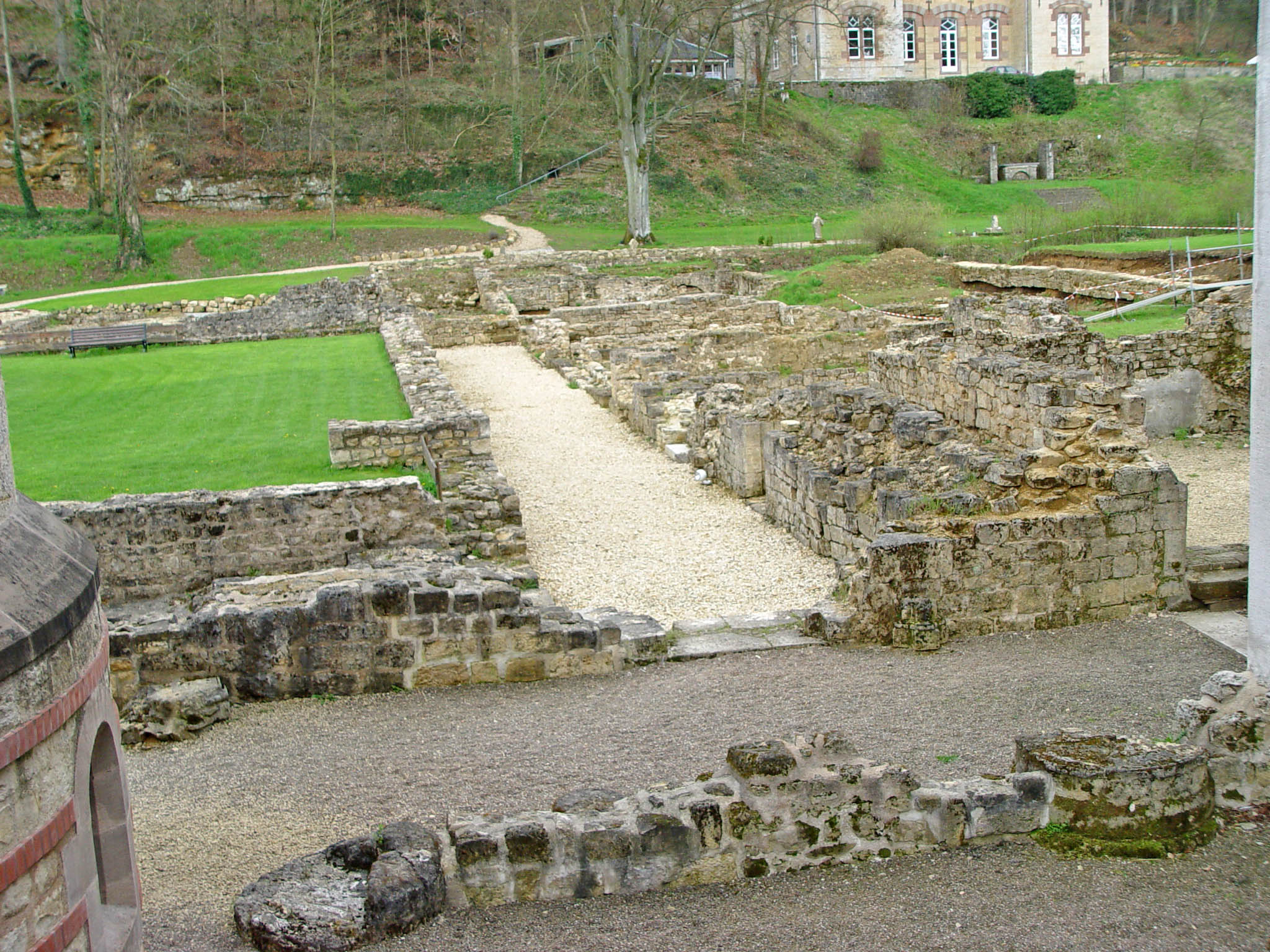 Clairefontaine (Belsch) - Ruine vum Klouschter